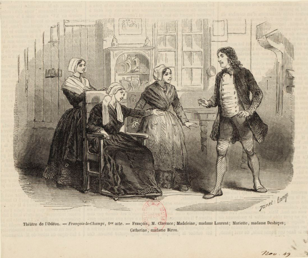 Janet-Lange, estampe montrant une représentation de la pièce "François le Champi" de George Sand adaptée de son propre roman. Dessin signé et daté de novembre 1849. Légende de l'image : "Théâtre de l'Odéon. François-le-Champi, 1er acte. François, M. Clarence ; Madeline, madame Laurent ; Mariette, madame Deshayes ; Catherine, madame Birou. Janet Lange". Une annotation ajoutée à la main en bas à droite indique "Nov. 1849".